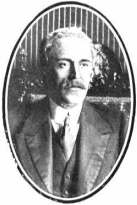 Fotografía del político español Manuel Portela Valladares publicada en 1912, cuando era gobernador civil de Barcelona y miembro del Partido Liberal.